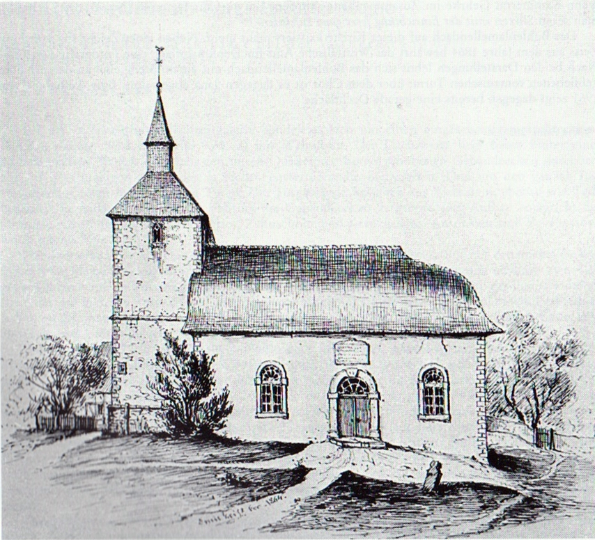 Silixen, Evangelische Kirche, Ansicht von 1864 mit Bohlenlamellendach